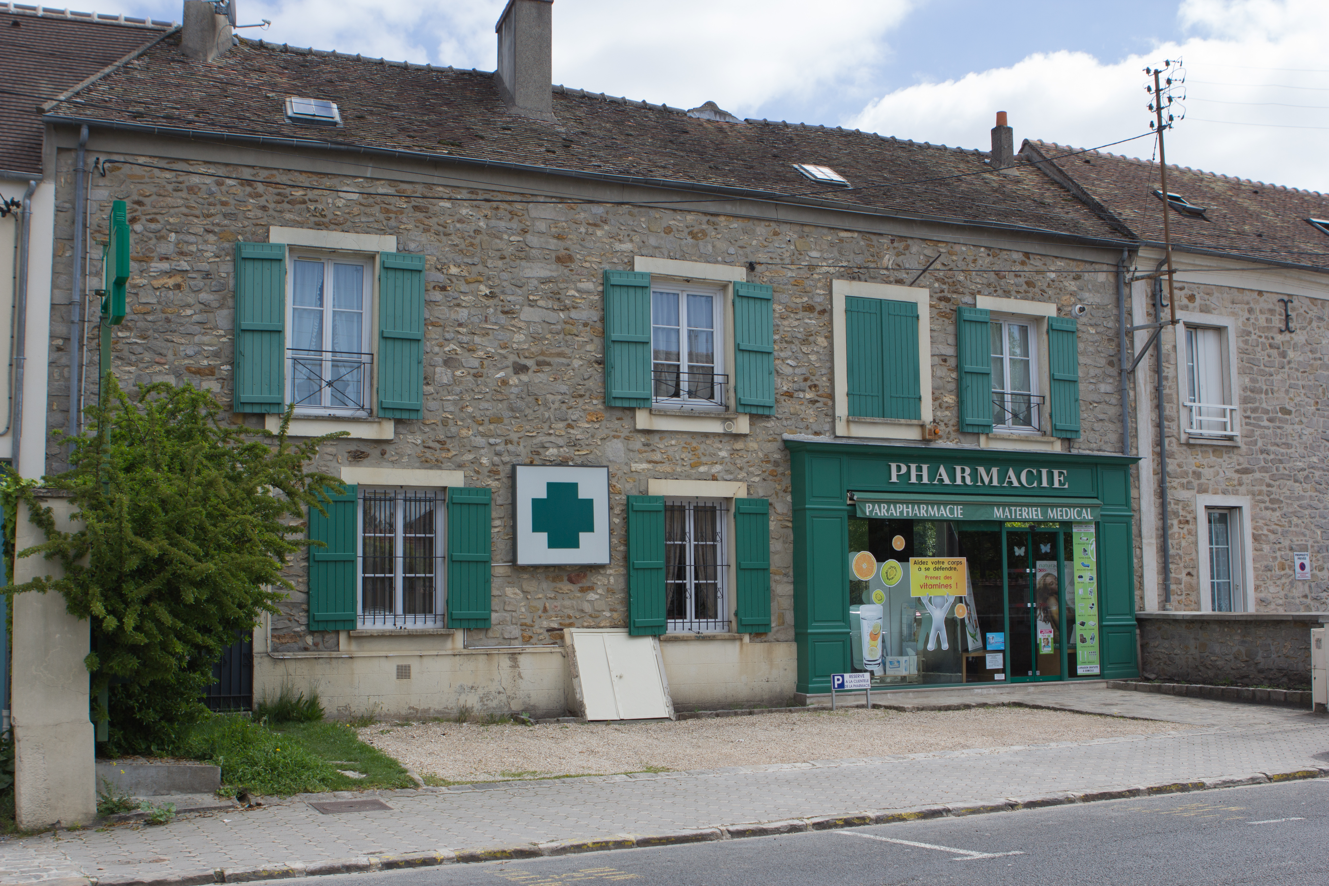 Pharmacie de Chailly-en-Bière (Seine-et-Marne, France).